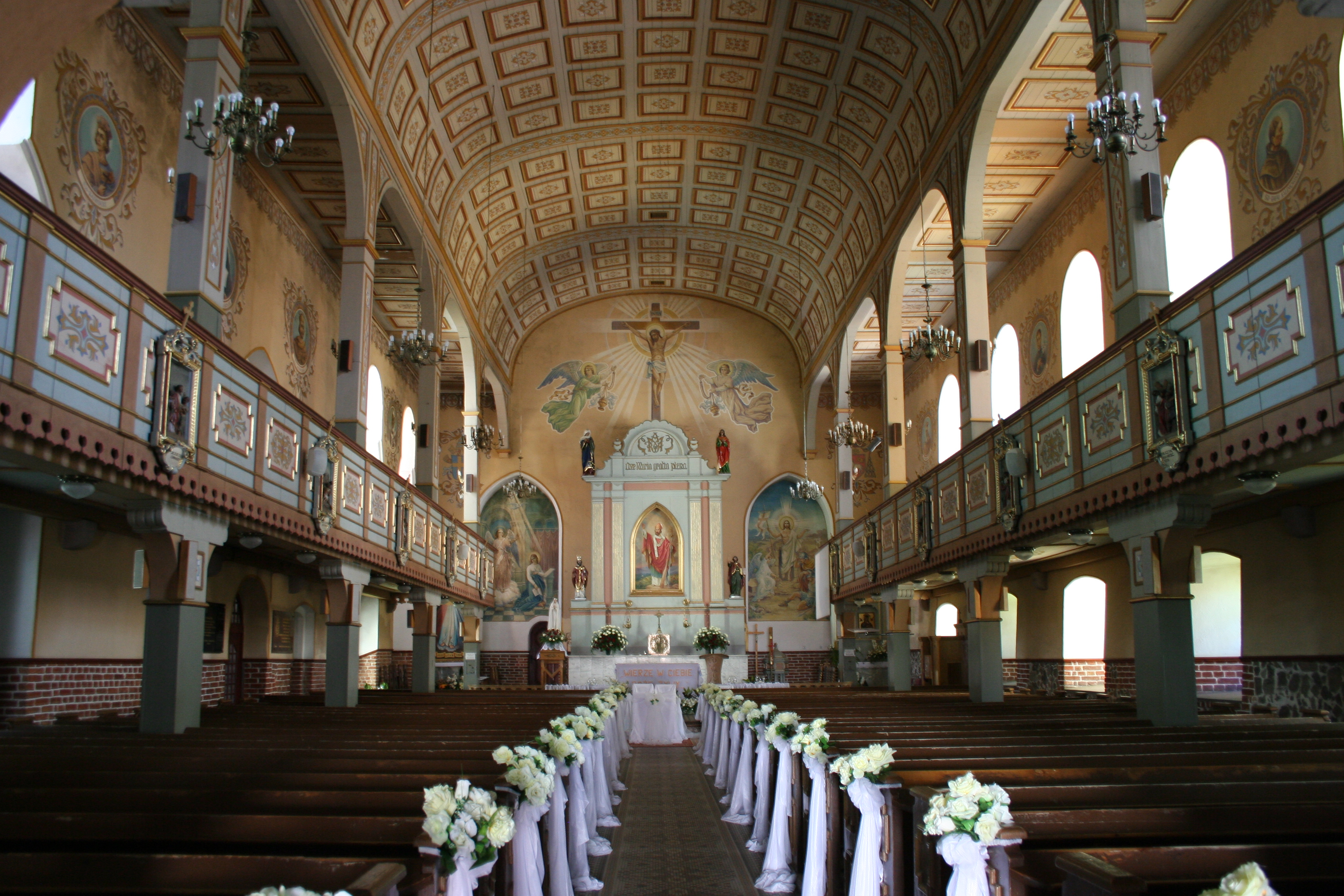 Nidzica, kościół rzym.-kat. par.p.w. św. Wojciecha i Niepokalanego Poczęcia NMP, kon. XIV, XVII, 1923-1924